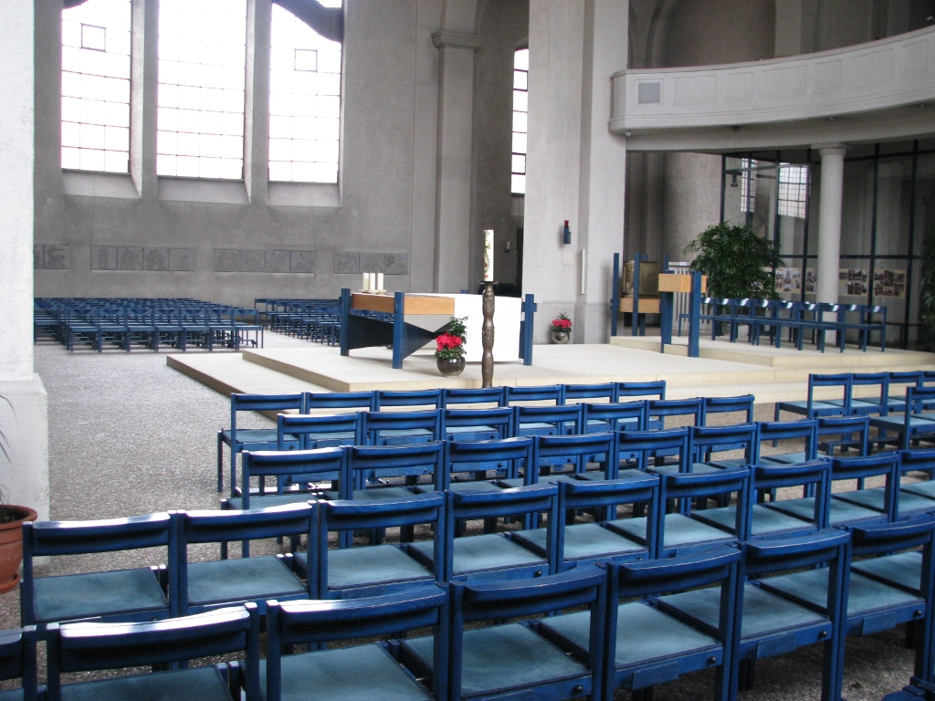 St.-Jakobus-Kirche in Mannheim